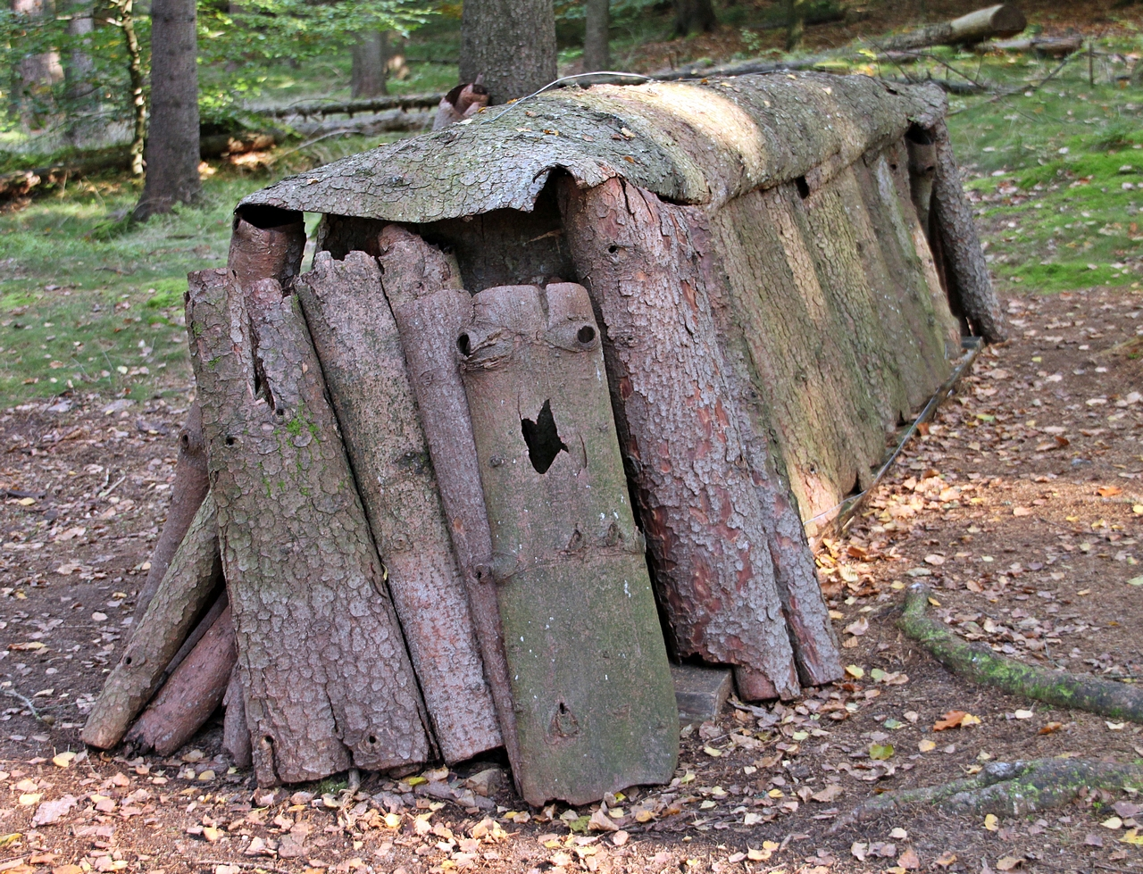 Hinterhermsdorf, Walderlebniszentrum "Waldhusche": Nachbau eines Trockengestells für Lohrinde. Insbesondere die Baumrinde von Eichen und Fichten enthielt viel Gerbsäuremit dem Gerbstoff Tannin, die von den Lohgerbern zur Lederherstellung benötigt wurde. Dazu musste die Rinde jedoch getrocknet und fein vermahlen werden. Die bei der Holzgewinnung in der Sächsischen Schweiz anfallenden Baumrinden wurden mit der Außenseite nach außen an einem Trockengestell aufgestellt, damit der Regen die Gerbsäure von der Rindeninnenseite nicht auswusch. Nach der Trocknung erfolgte dann die feine Vermahlung und die Weiterverarbeitung durch den Lohgerber.